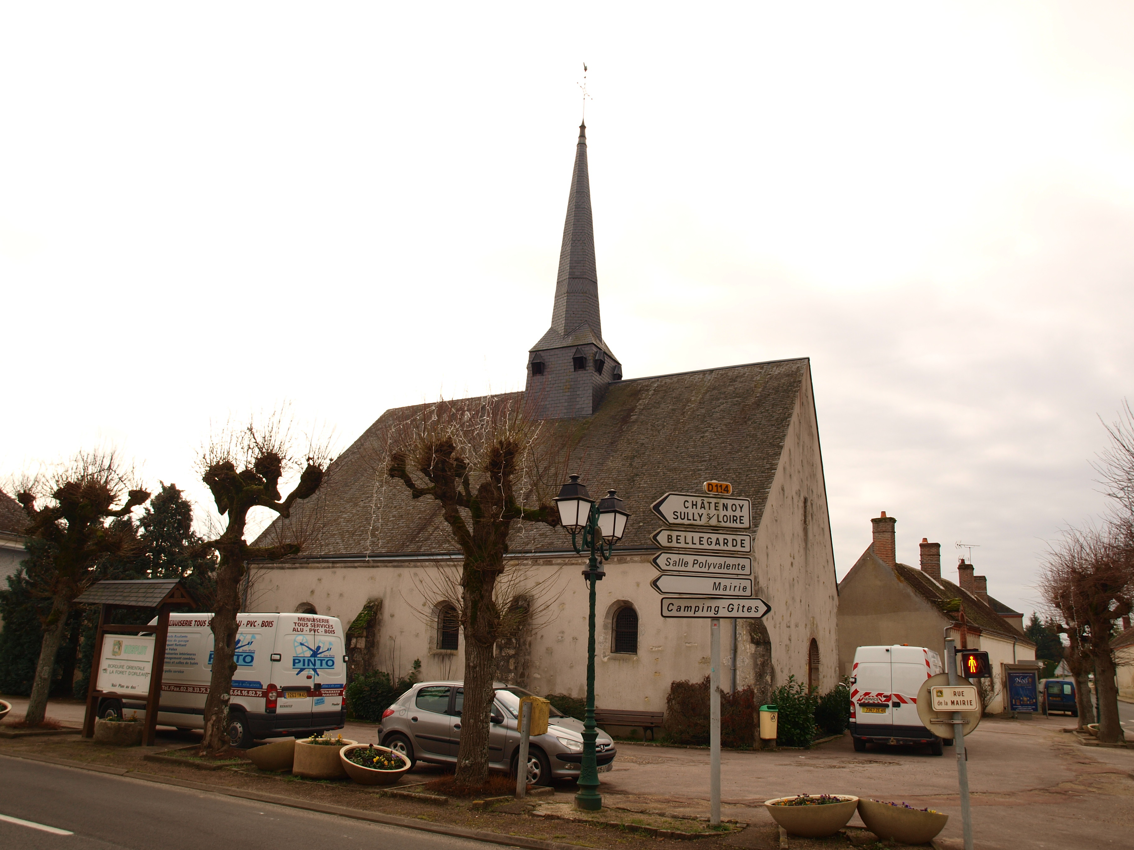 Nesploy (Loiret, France)